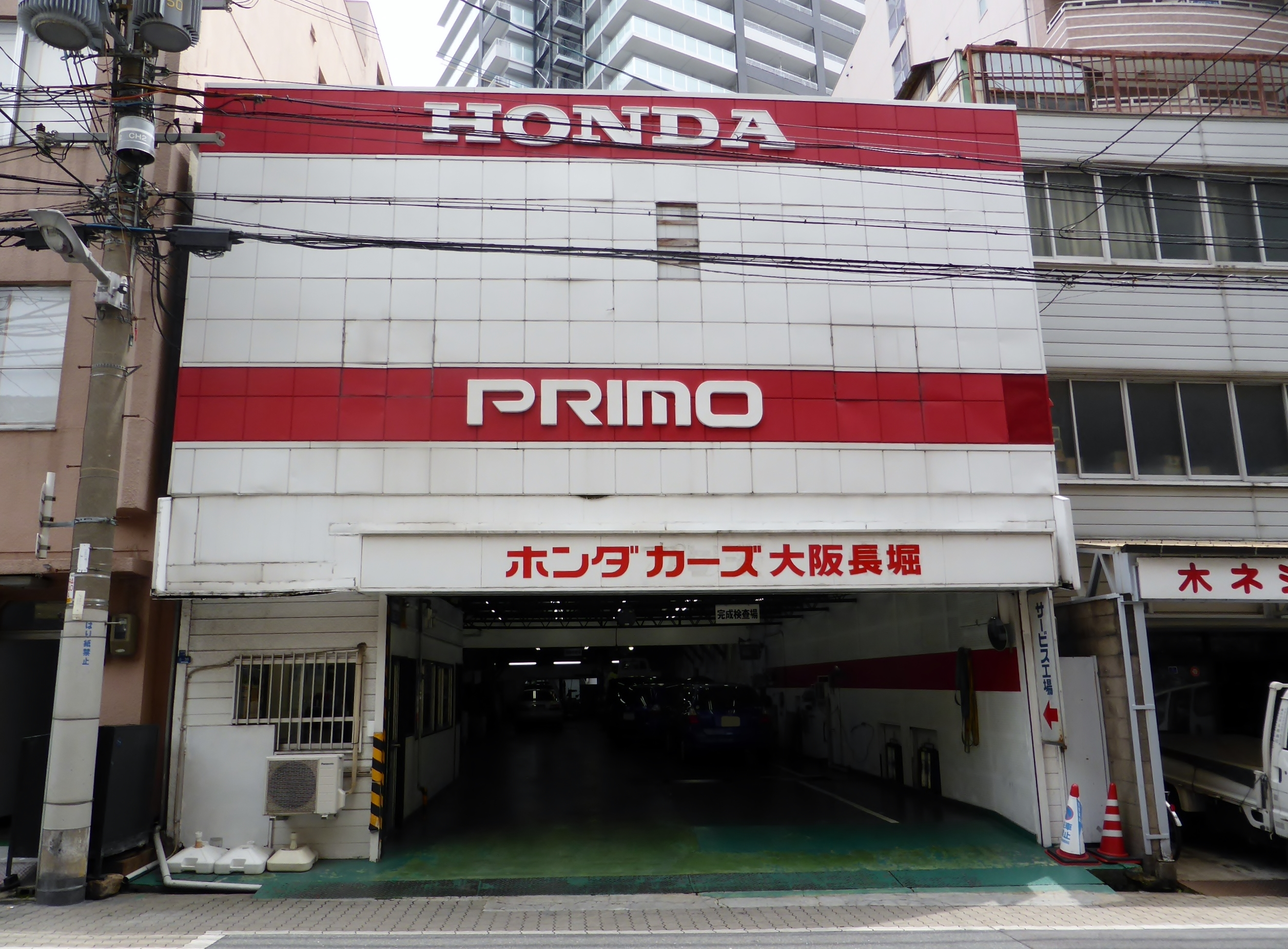 ホンダカーズ(旧・ホンダプリモ)大阪長堀を撮影。